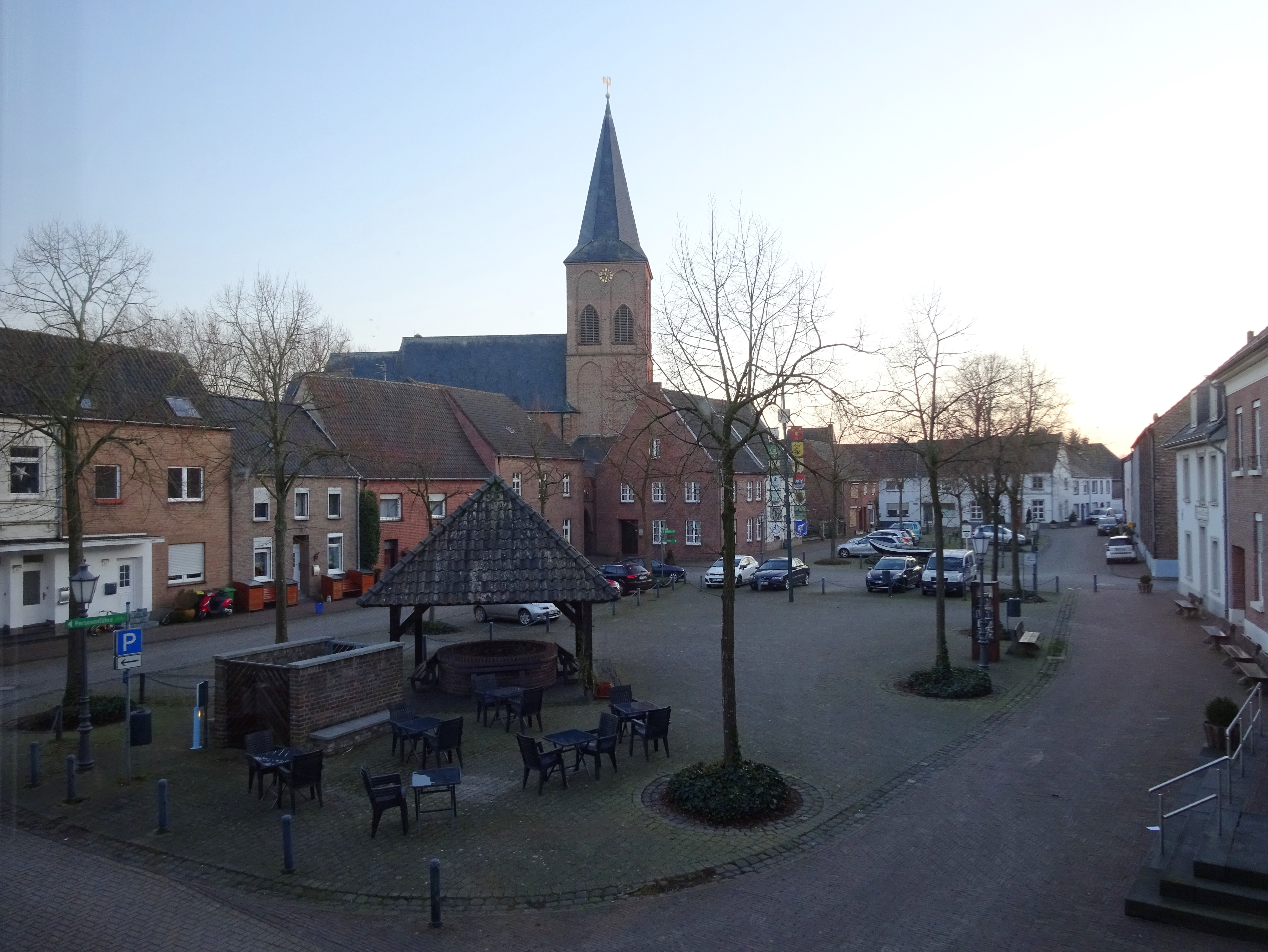 Kalkar-Grieth, Griether Markt met op de achtergrond St. Peter en Pauluskerk